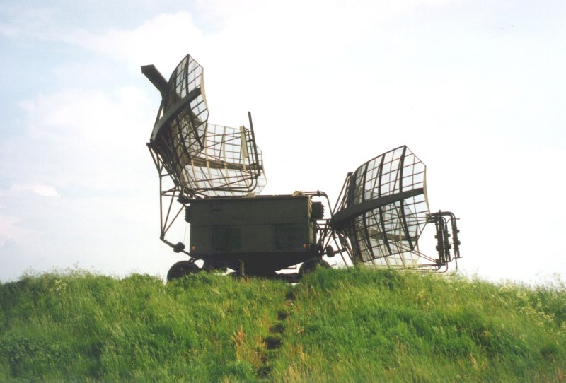 P37 „Bar Lock” in Elmenhorst: Außerdienststellung 1997; umgerüstete Version auf IFF Siemens 1990